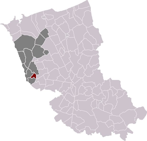 Locatie gemeente Wulverdinge in arrondissement Duinkerke. Zelfgemaakt. Location of Wulverdinghe municipality in the arrondissement of Dunkirk. Self made. Localisation de la commune de Wulverdinghe dans l'arrondissement de Dunkerque. Fait moi-même.